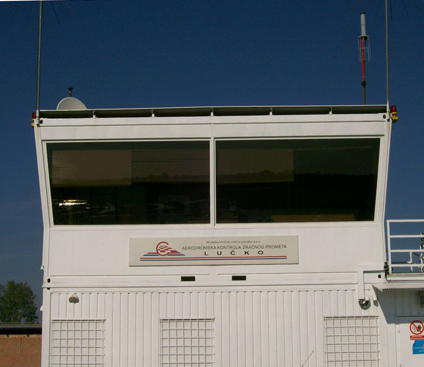 Ploča "Aerodromska kontrola zračnog prometa Lučko"